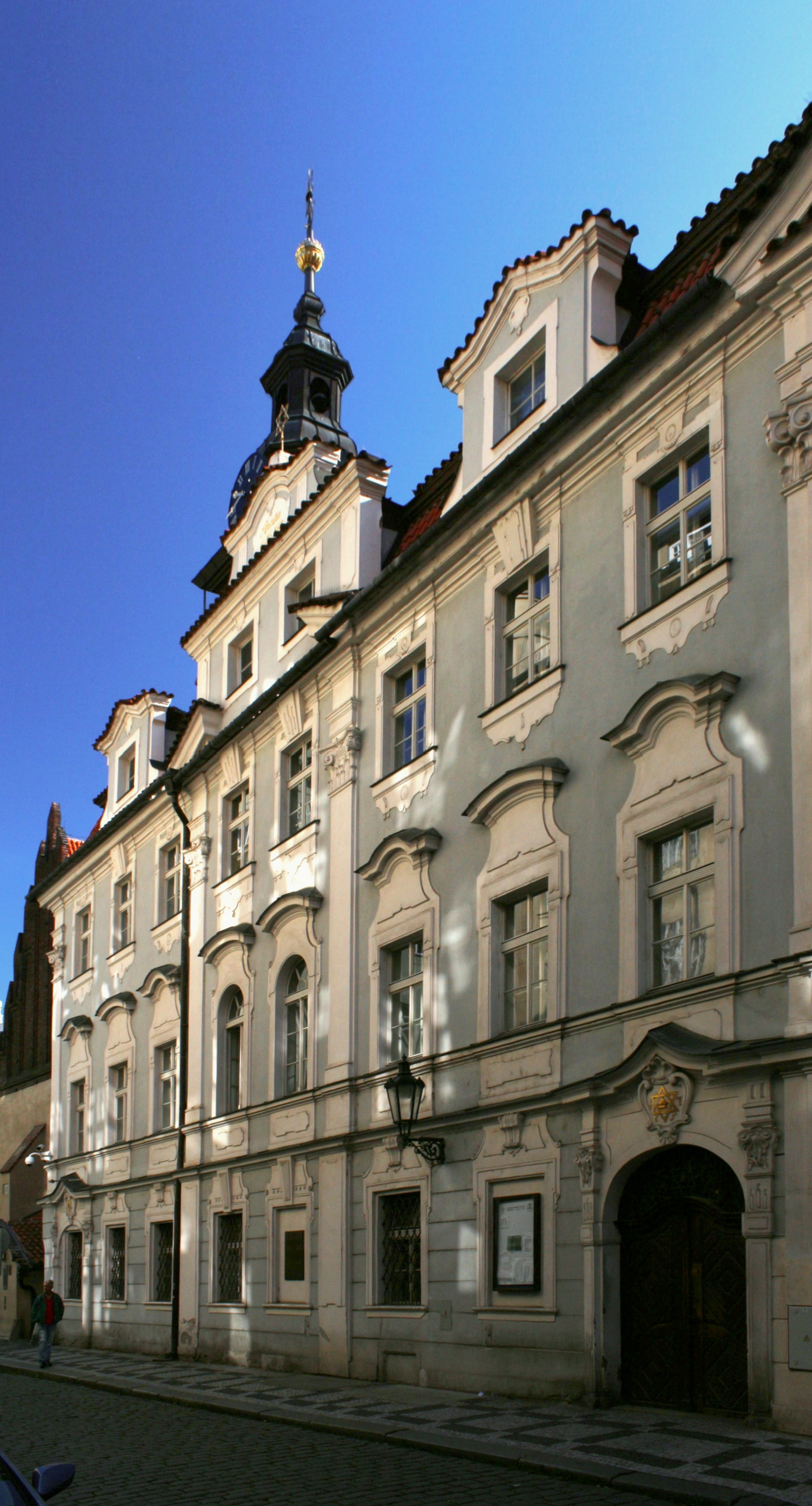 Praha 1-Josefov, židovská radnice